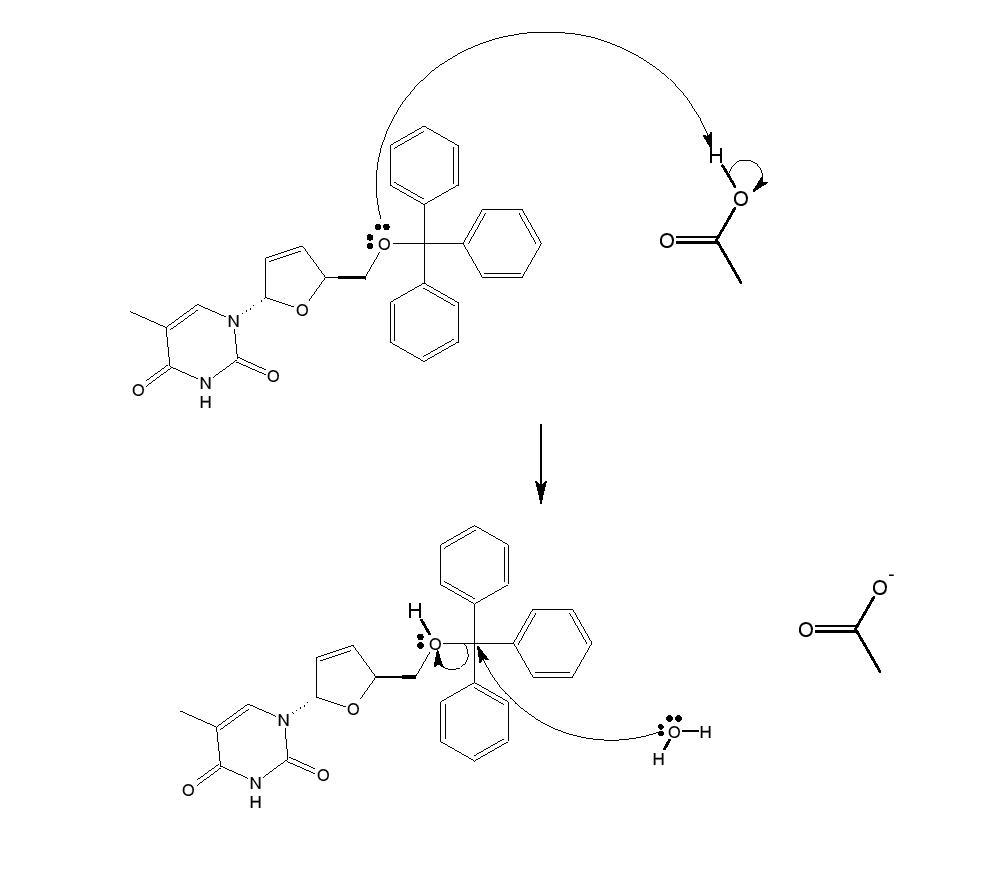 L'acide acétique protone l'oxygène lié au triphénylméthyle, puis le groupement triphénylméthanol est libéré.